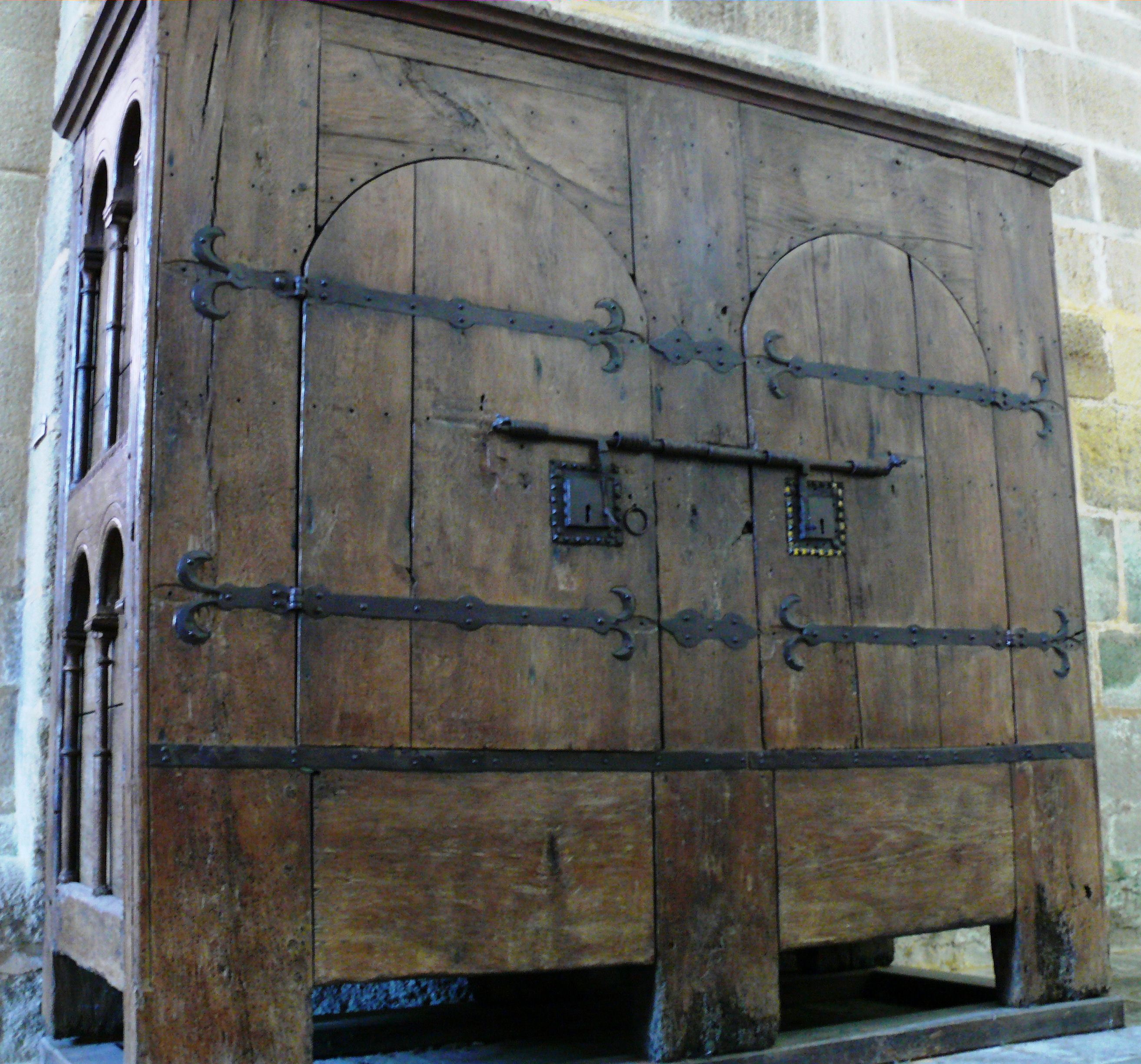 Abbaye d'Aubazine - L'armoire liturgique la plus ancienne de France